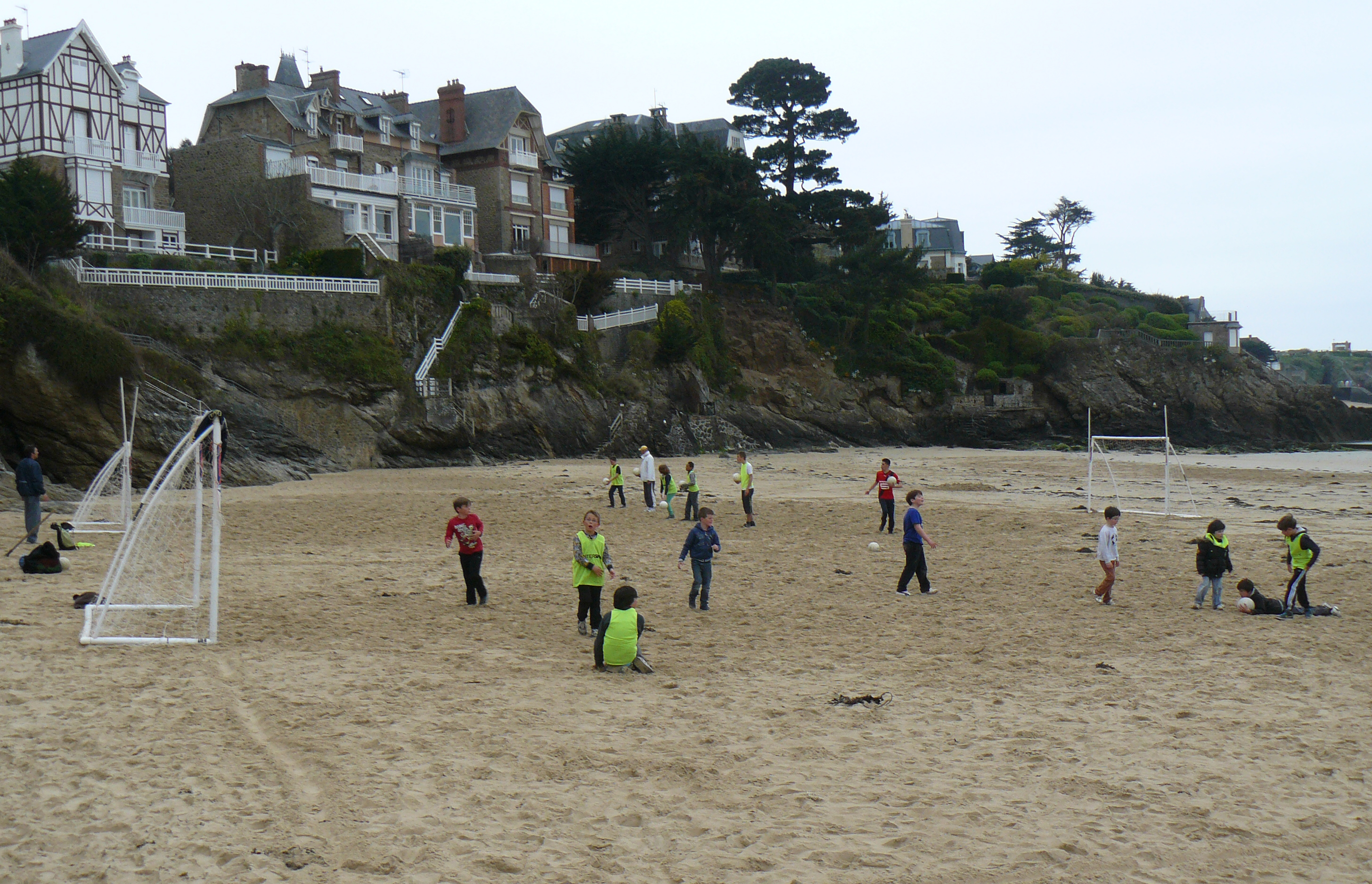 Initiation au football gaélique sur la plage de Saint-Lunaire - Bretagne - France Organisé par l'Entente gaélique de Haute-Bretagne 2 mai 2013